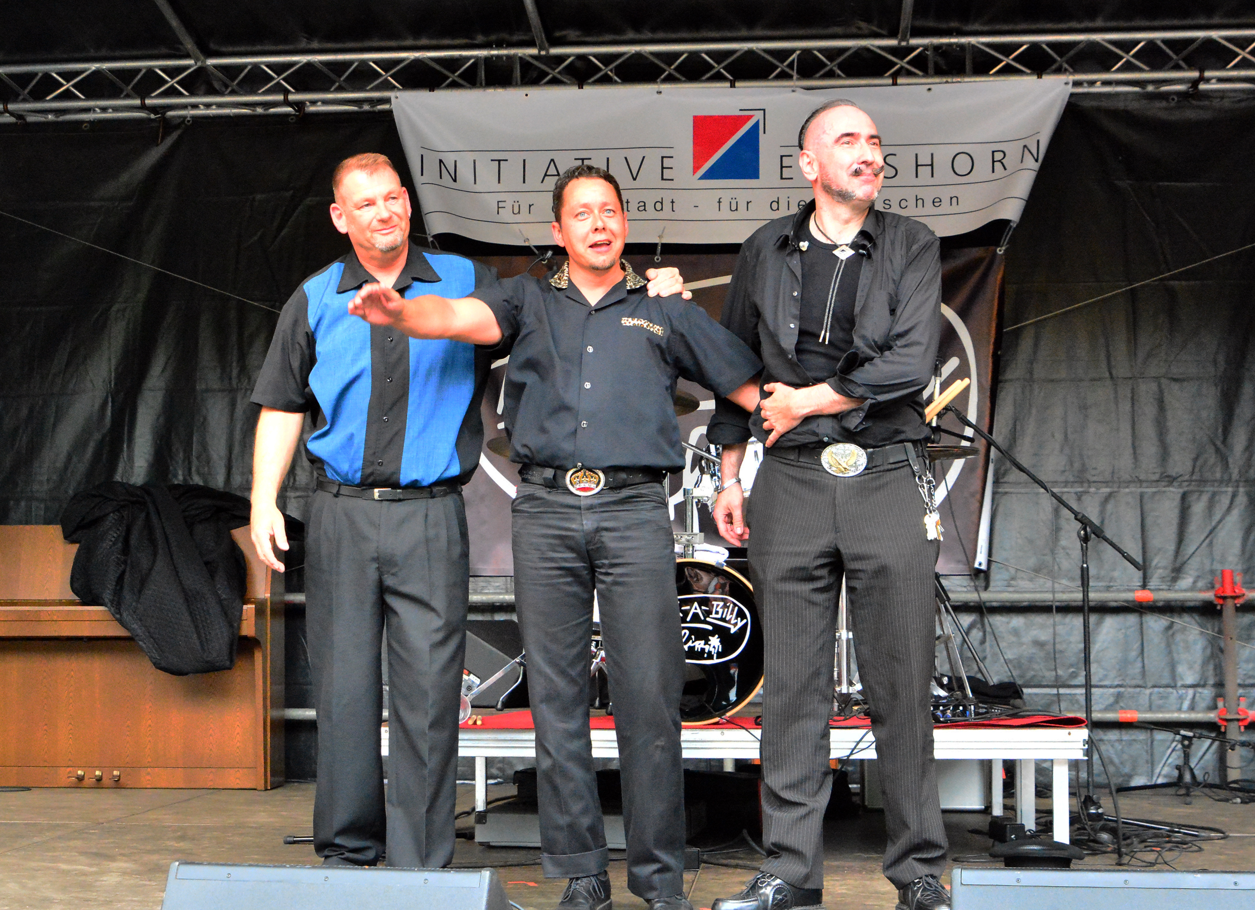 Rockabilly Mafia beim „Jazz 'n Roses 2015“ im Liether Rosengarten Elmshorn